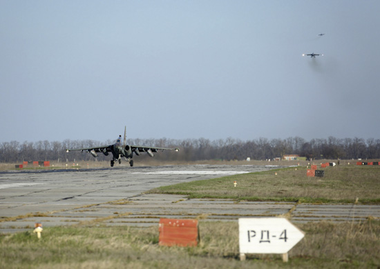 Возвращение российских военных лётчиков с авиабазы Хмеймим в Сирии на авиабазу Приморско-Ахтарск Южного военного округа в Краснодарском крае